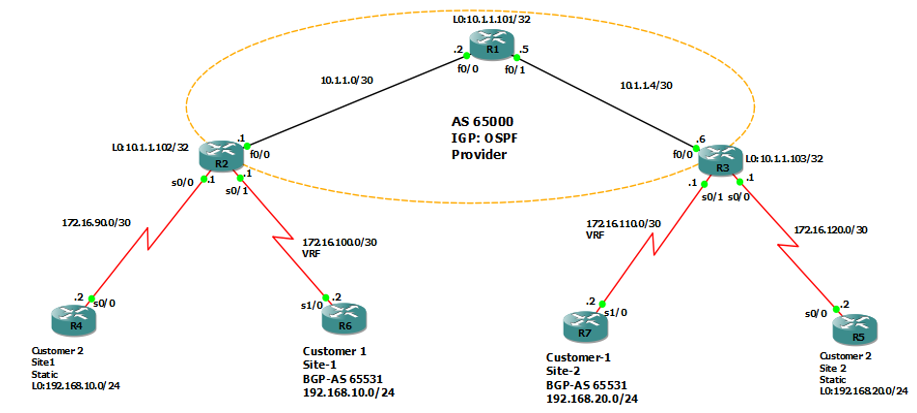 Монгол: BGP -г VPN MPLS -тэй хамт хэрэгжүүлсэн топологи